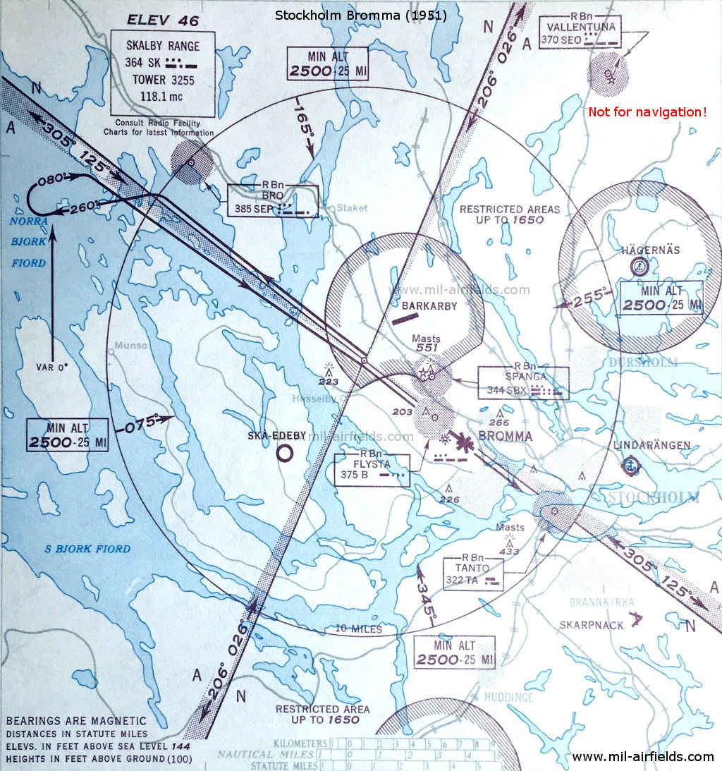 LFR-lähestyminen Bromman lentoasemalle